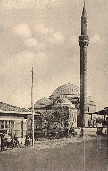 Muslihuddin bin Abdülgani (Müezzin Hoca - Dükkancık) Camii, Üskub, Makedonya